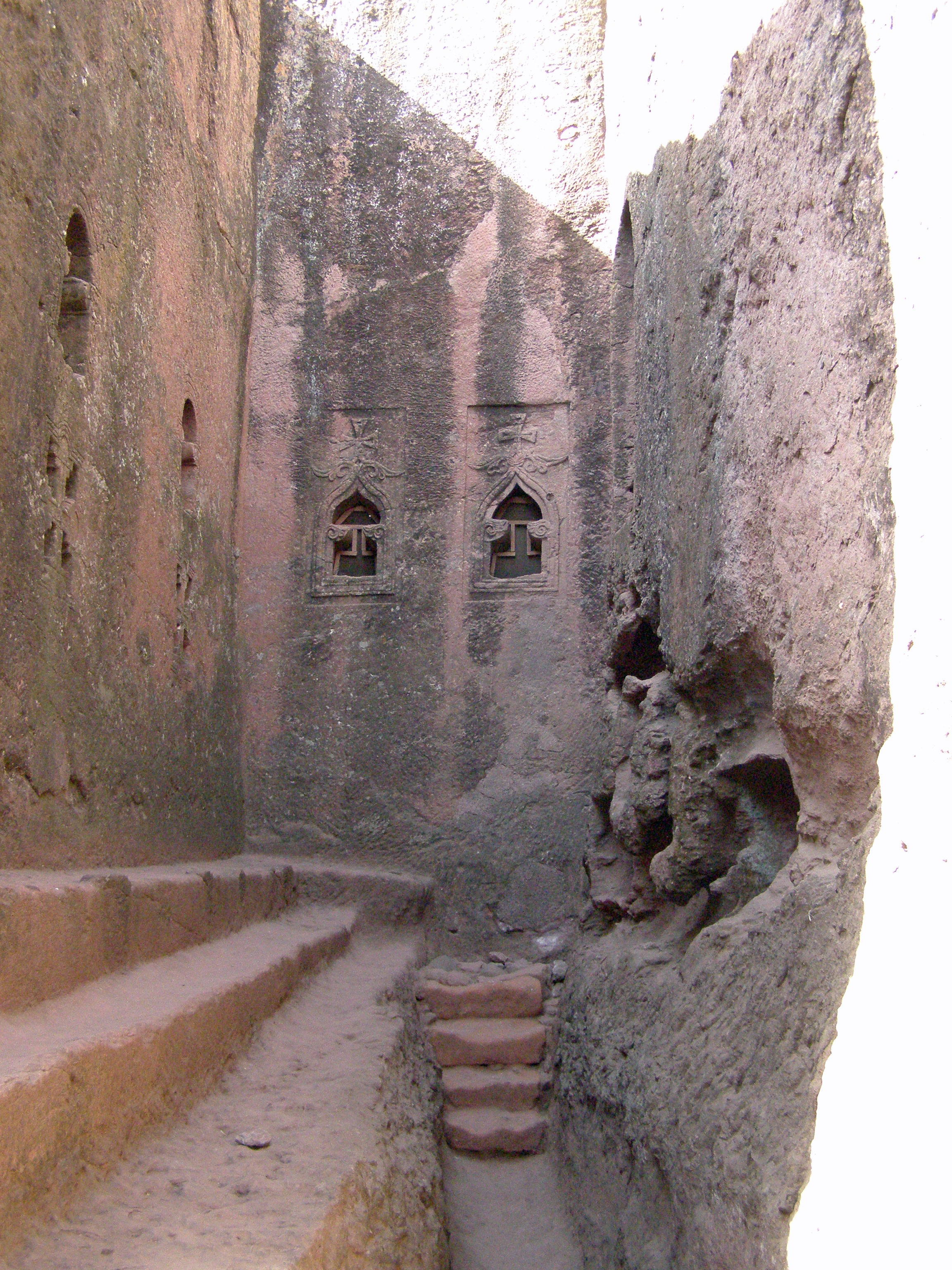 Ethiopie - Eglises rupestres de Lalibela - Soubassement à 3 gradins de Biet Debre Sina